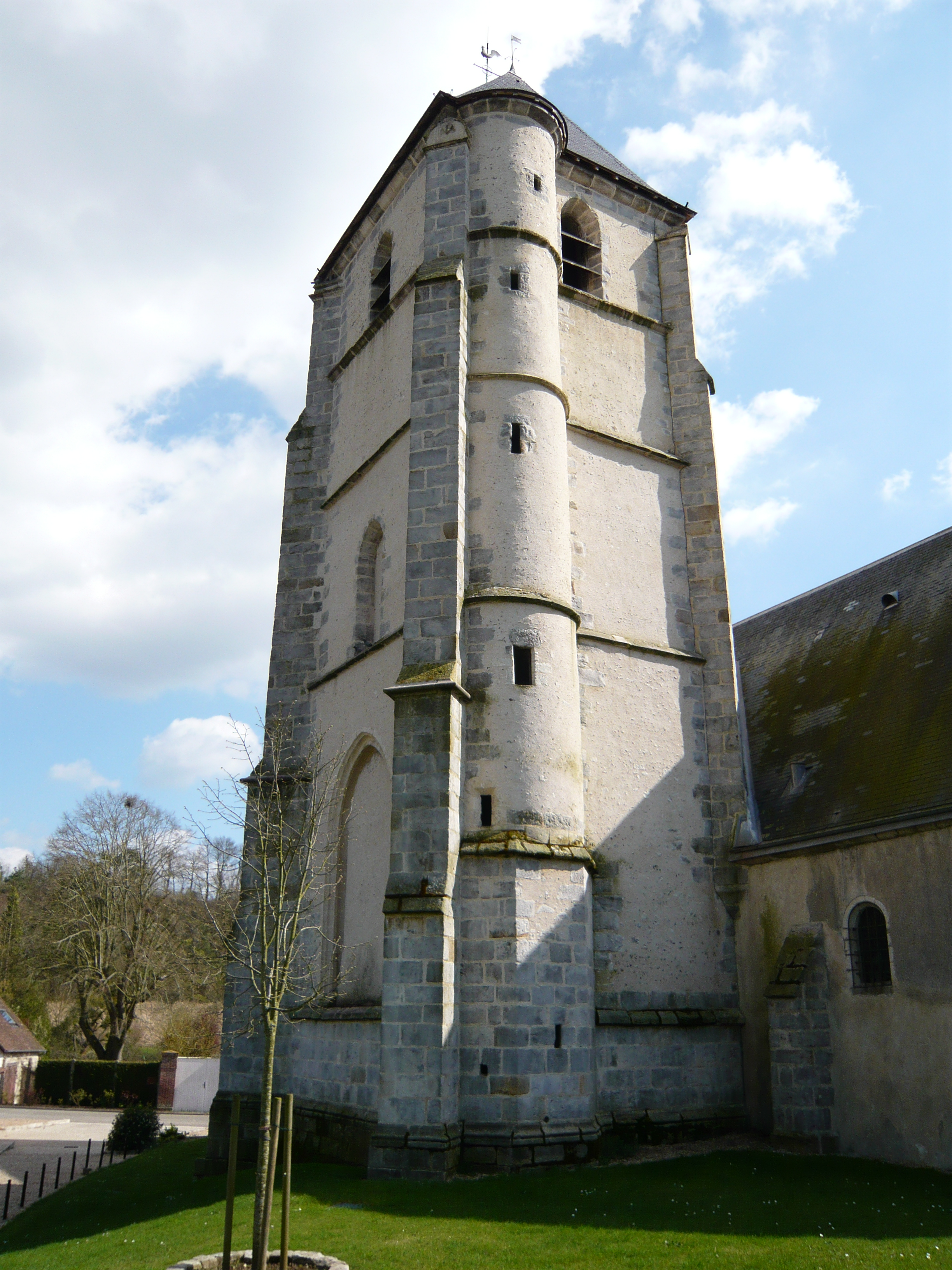 église Saint-Cyr-et-Sainte-Julitte d'Ouerre, Eure-et-Loir, France.